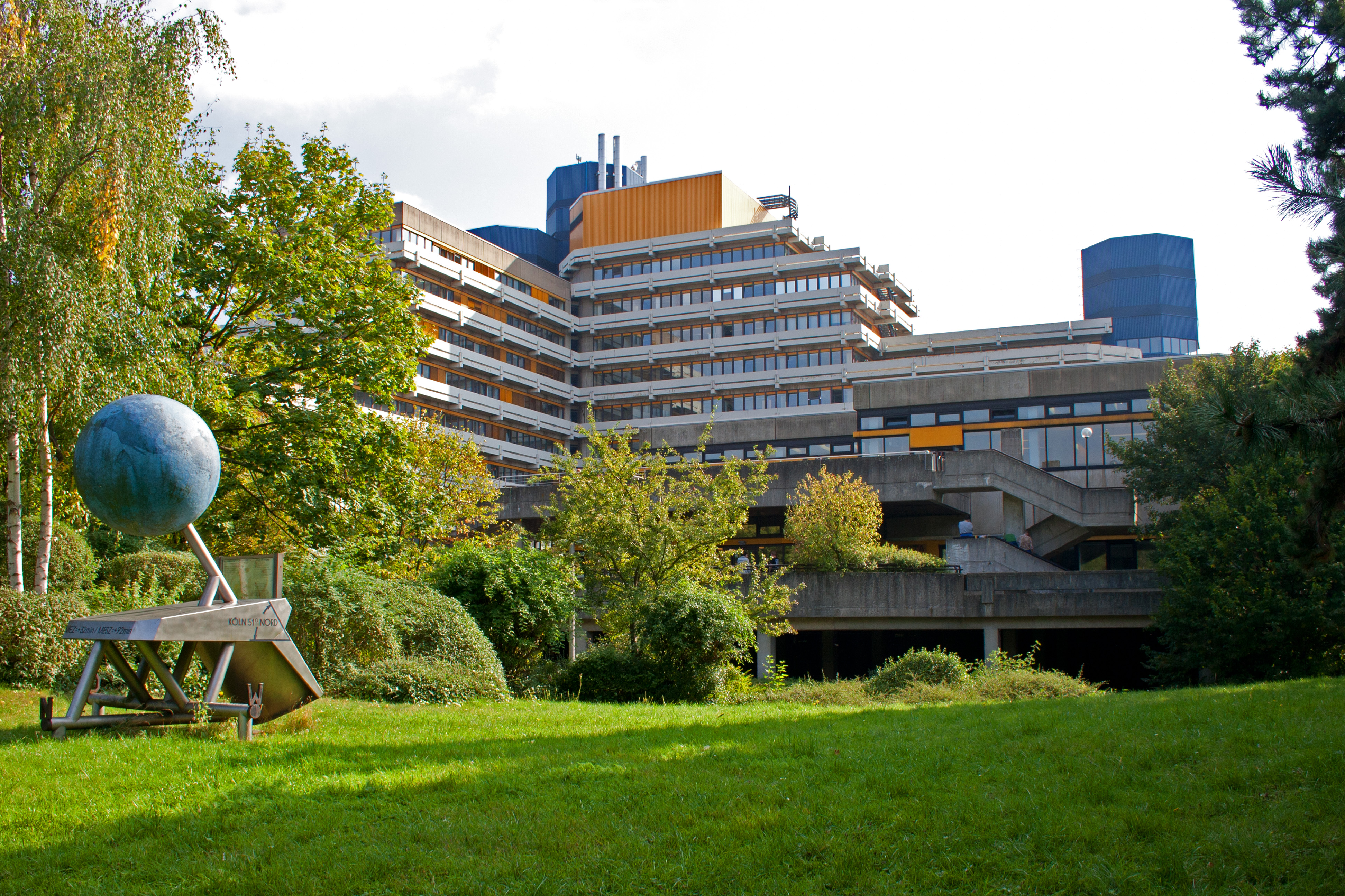 Fachhochschule Köln, Ingenieurwissenschaftliches Zentrum Köln-Deutz, Betzdorfer Str. 2, Kreuzbau, Nebengebäude und Außenanlagen, am 22.02.2013 unter der laufenden Nummer 10176 in die Denkmalliste der Stadt Köln eingetragenThis is a photograph of an architectural monument.